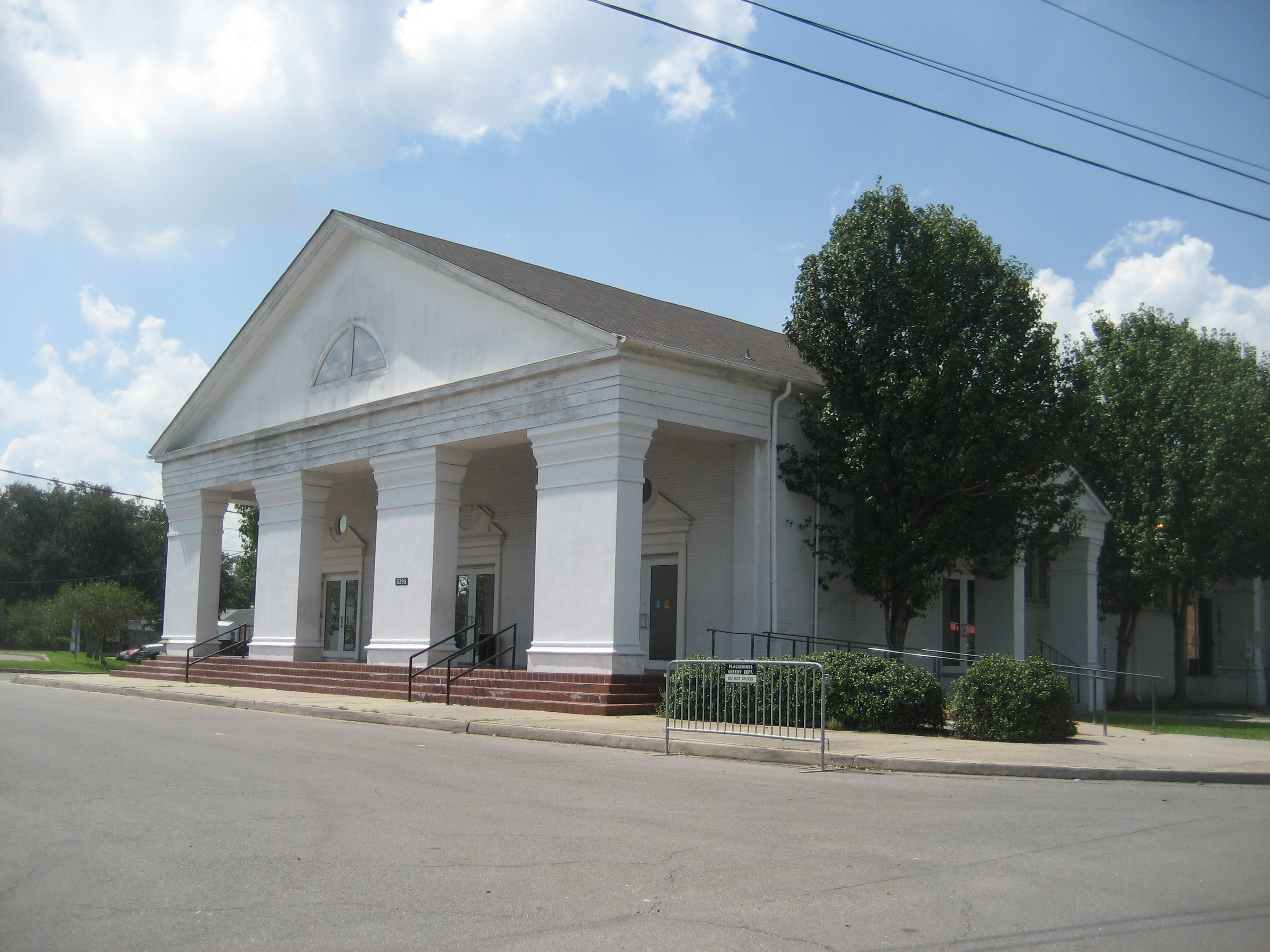 Belle Chase Auditorium, Belle Chasse, Louisiana.